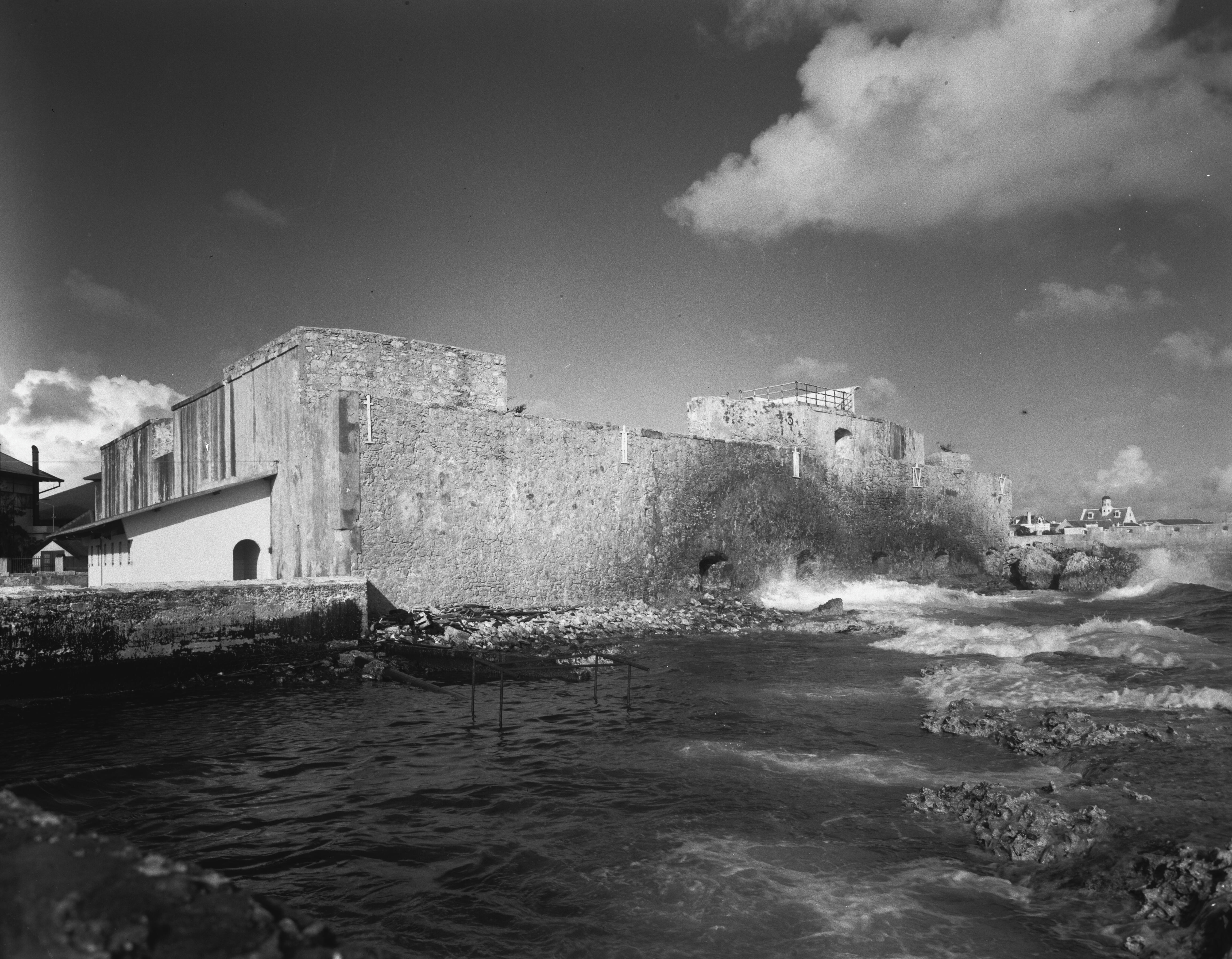 Otrabanda, Riffort, zeezijde, gezien uit zuidwestenOnderwerp: forten